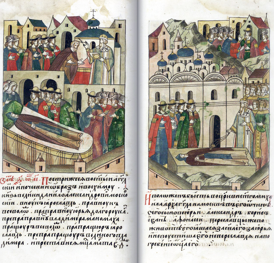 ЛИЦЕВОЙ ЛЕТОПИСНЫЙ СВОД В 6811 году. Постригся в святой ангельский и иноческий образ и в схиму князь великий Данило Александрович Московский, внук Ярославов, правнук Всеволодов, праправнук Юрия Долгорукого, препраправнук Владимира Манамаха, (потомок) пращура Всеволода, прапращура Ярослава, препрапращура великого Владимира, и преставился месяца марта в 4-й день. И положен был в церкви святого Михаила Архангела на Москве, в своей отчине. Его сыновья: Юрий, Александр, Борис, Иван, Афанасий. Переславцы же после смерти его встали за сына его, за Юрия, и не пустили его из Переславля на погребение отца его.